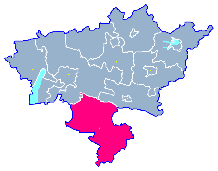 Locator maps for communes in województwo zachodniopomorskie : Dolice gm.png (podział na gminy)